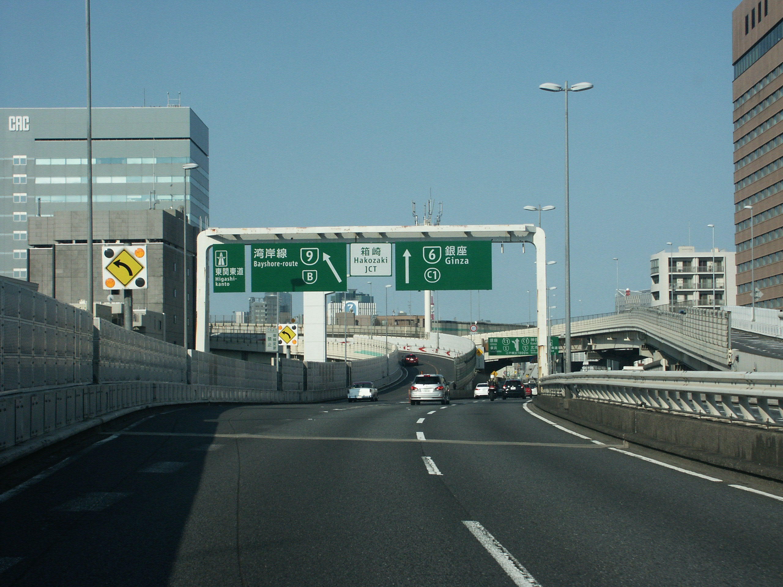 首都高速道路6号向島線箱崎JCT分岐付近